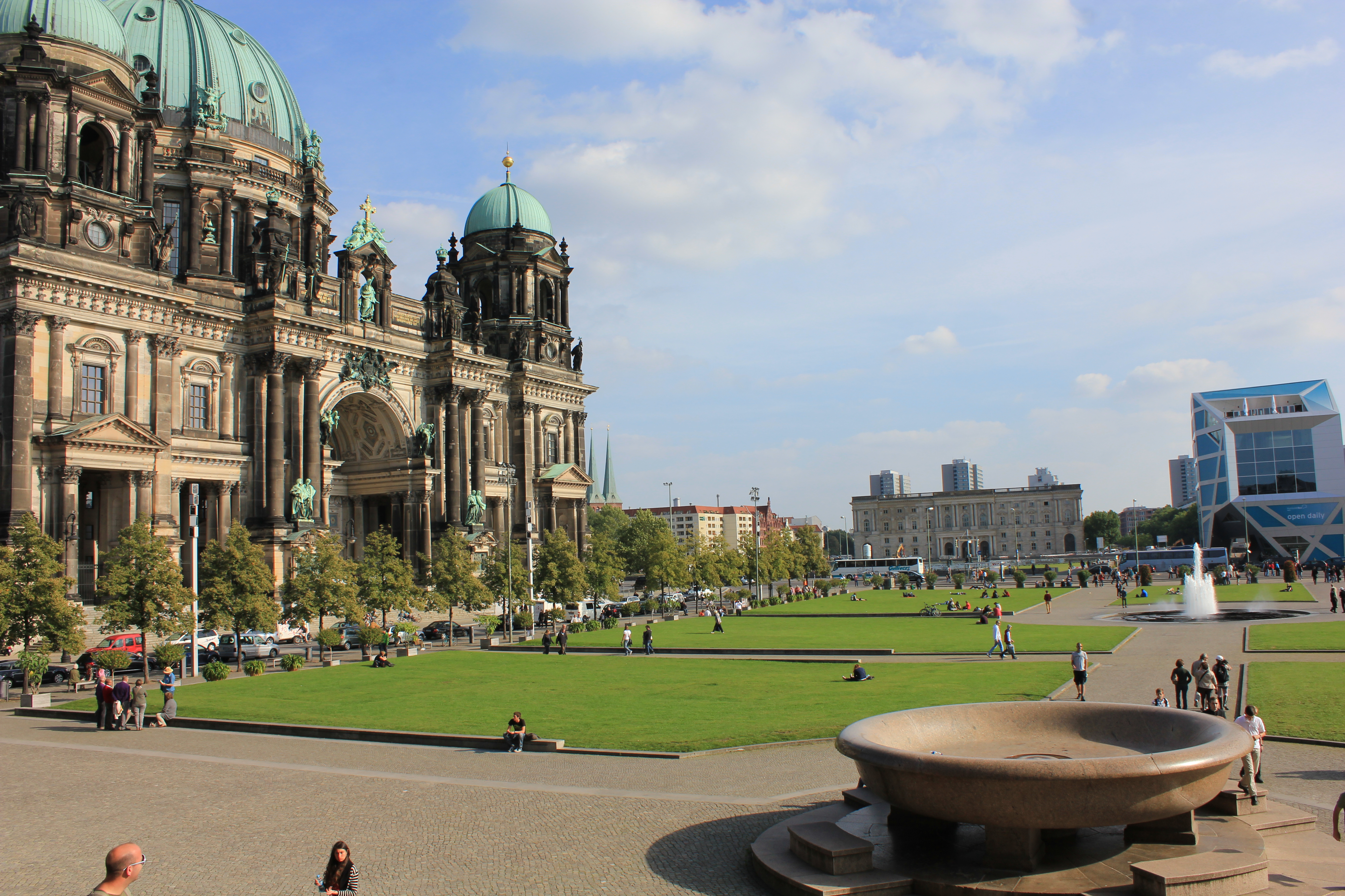 Ansicht auf die linke Seite